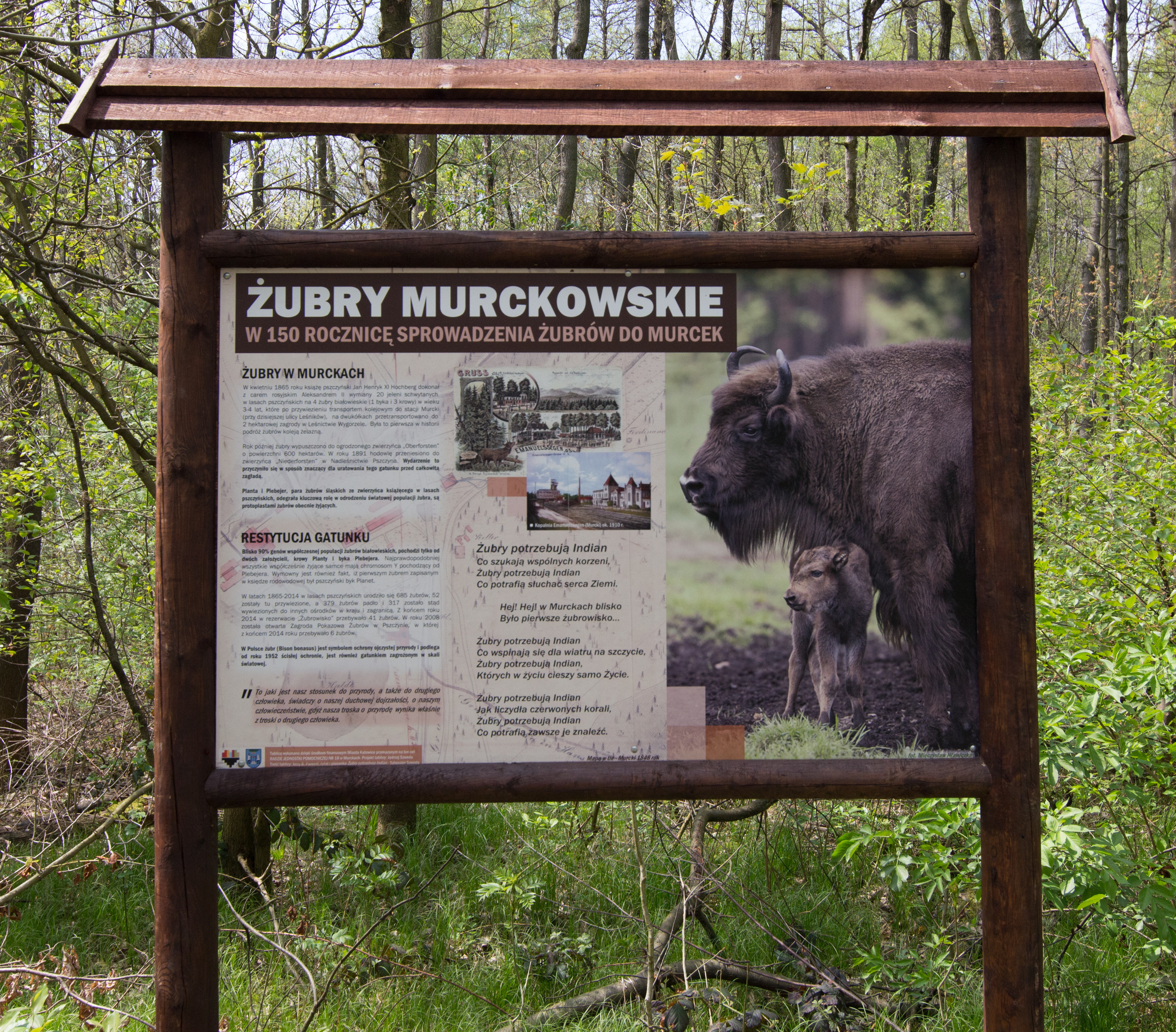 Tablica opisująca hodowlę żubrów w lasach Murckowskich (Katowice)